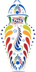 Escudo e San Pablo del Monte 2017-2021